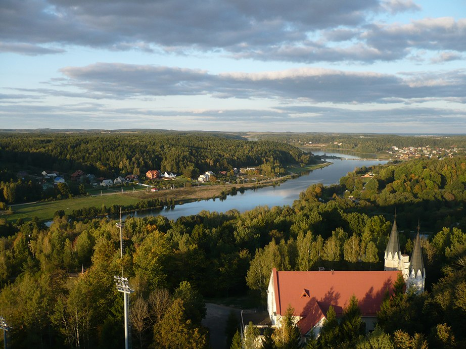 Раўбіцкае вадасховішча